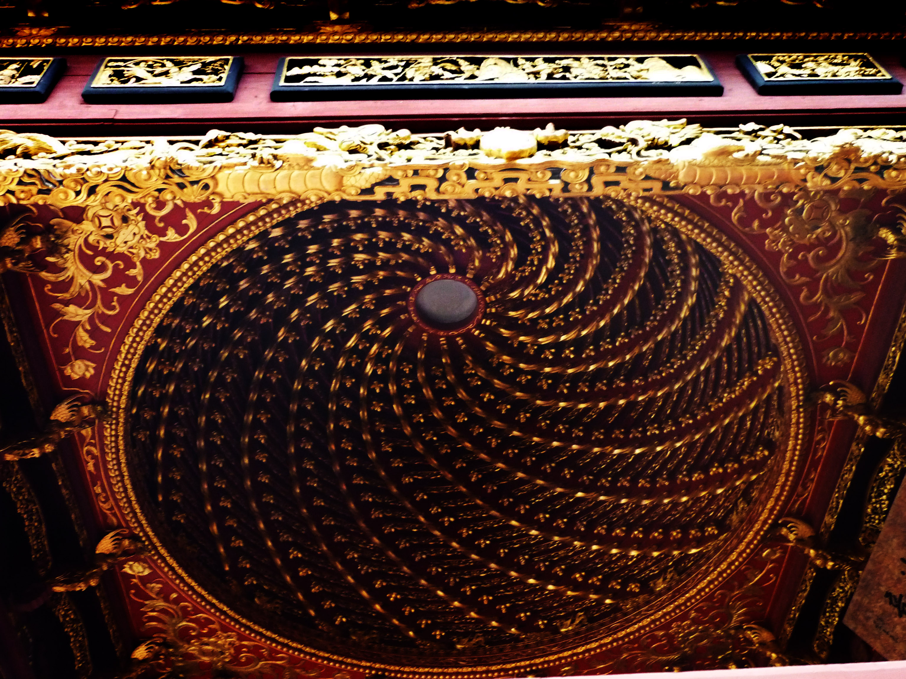 庆安会馆戏台顶部